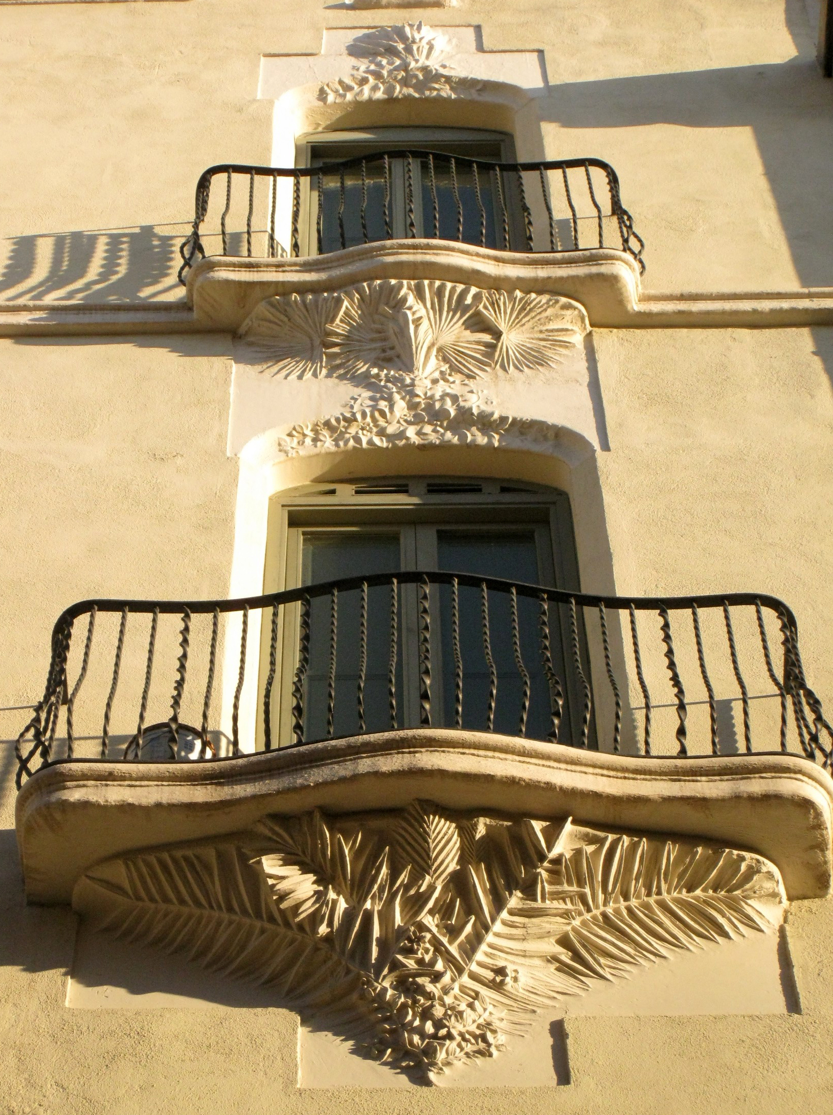 Antic Hotel Peninsular, conegut popularment com l'Hotel Pompidor, obra de Lluís Muncunill de 1903, al carrer de Sant Pere núm. 52 (Terrassa). Detall dels balcons de la façana.